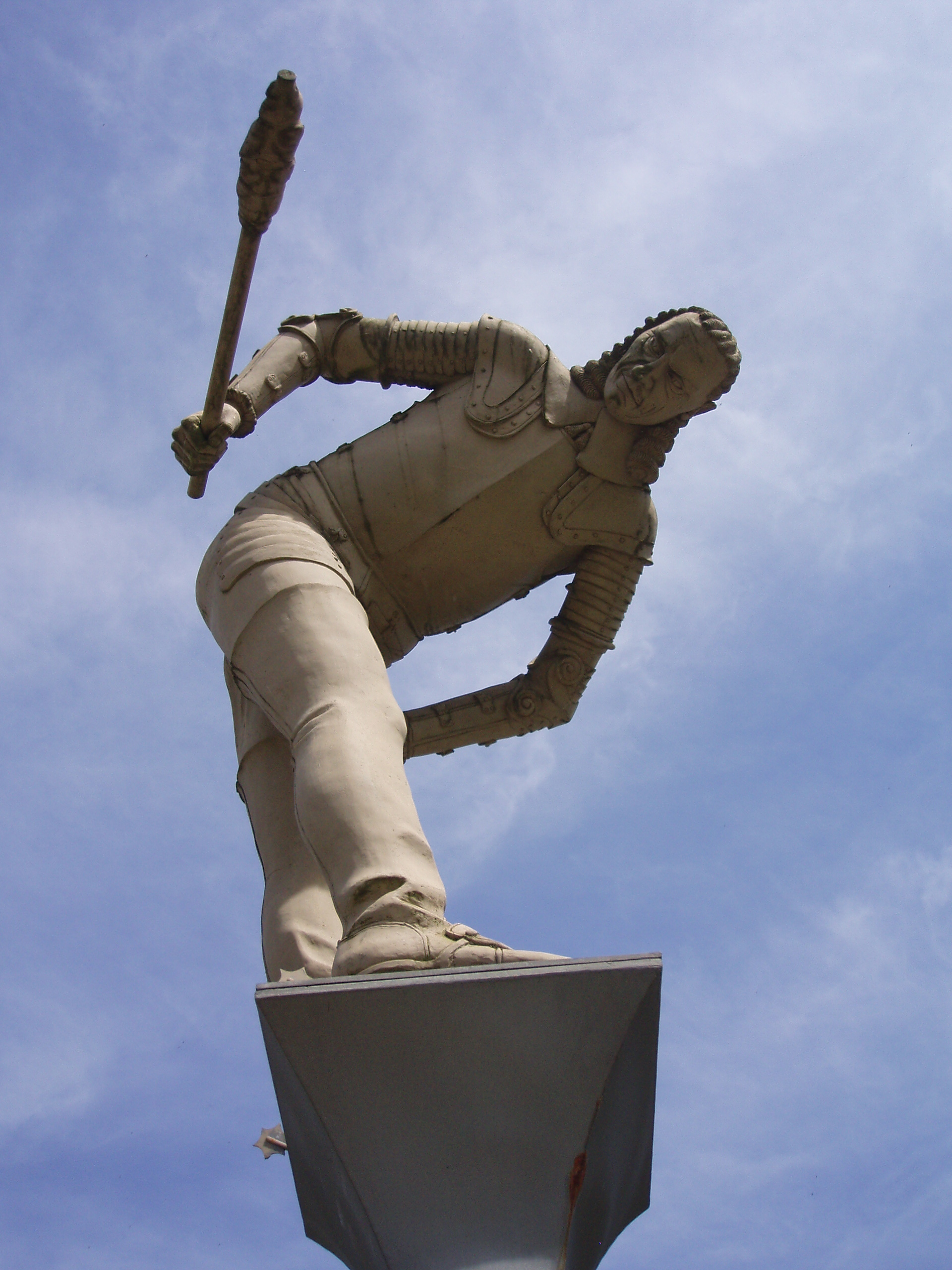 Figur Melacs von Peter Lenk in Hirsau